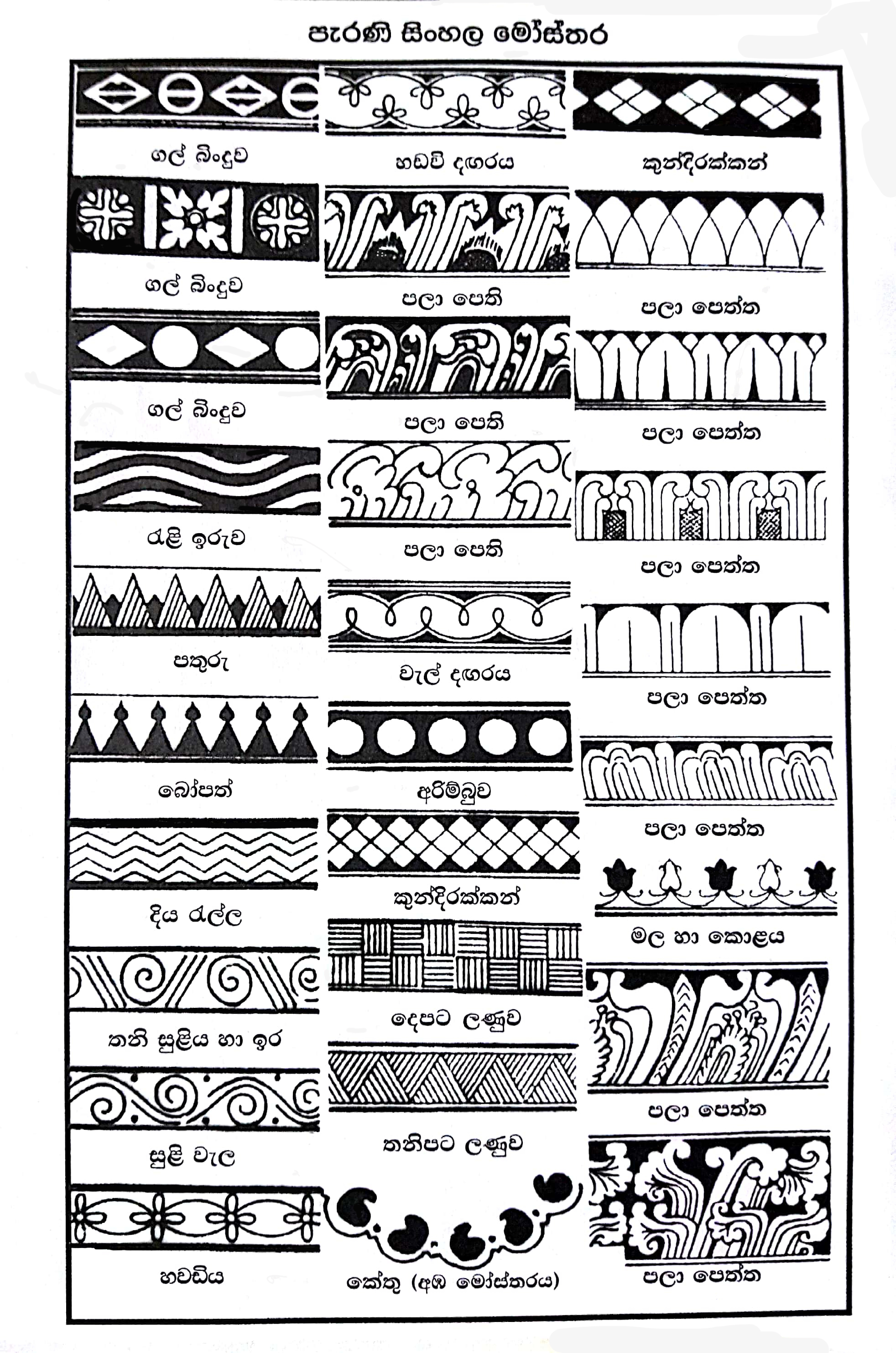 සිංහල: පාරම්පරික සිංහල සැරසිලි මෝස්තර